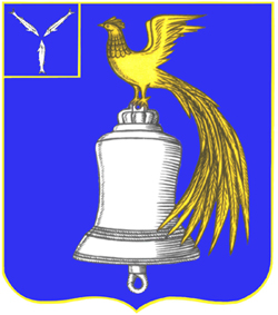 ГербТатищевскогоРайона